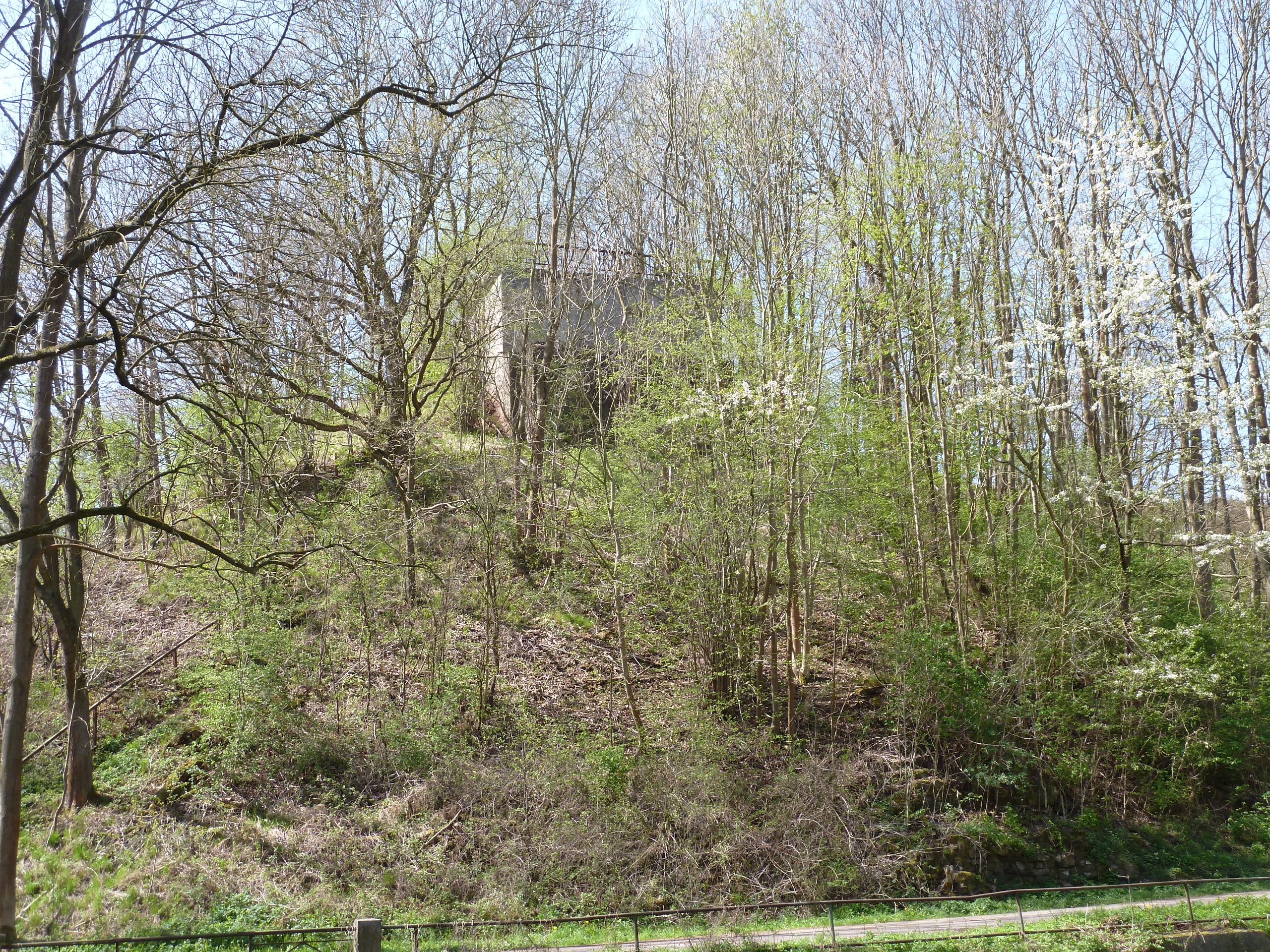 Westliches Widerlager der ehemaligen Brücke über das Friedatal, Kanonenbahn bei Frieda, Gemeinde Meinhard